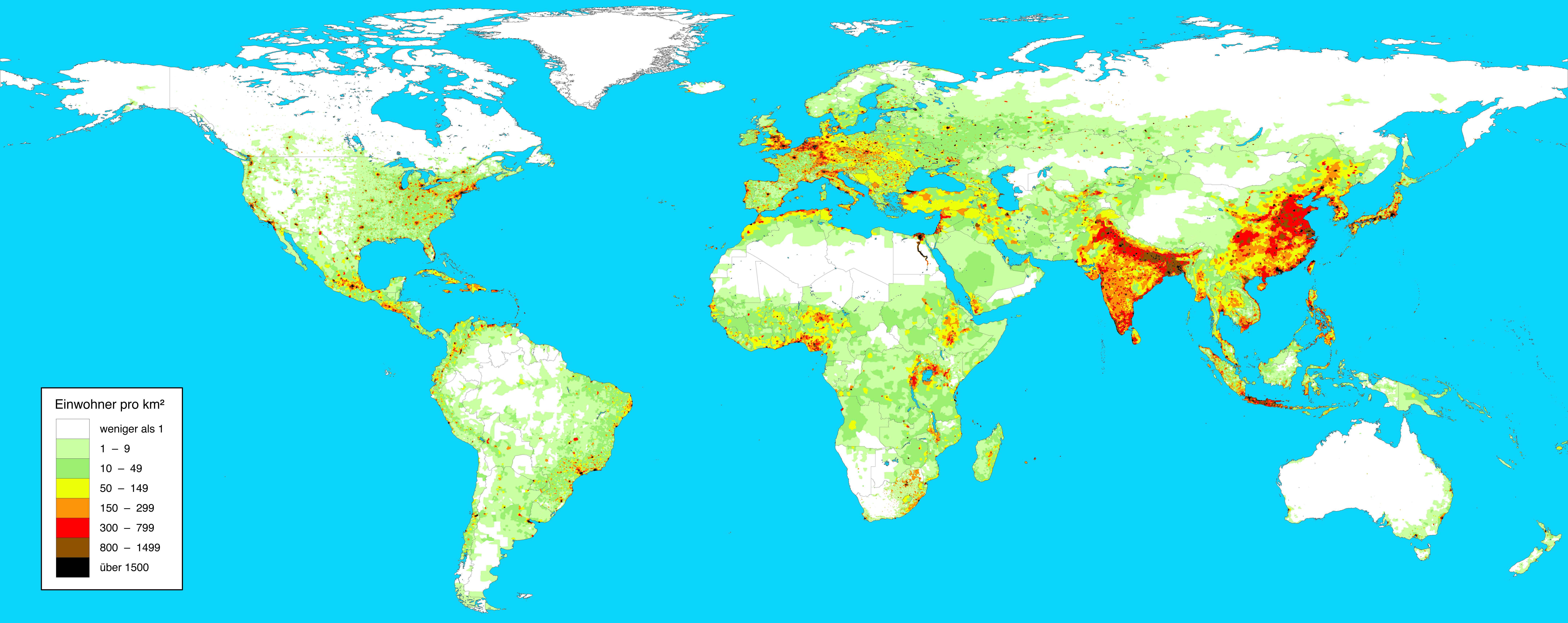 Bevölkerungsdichte der Welt 2005